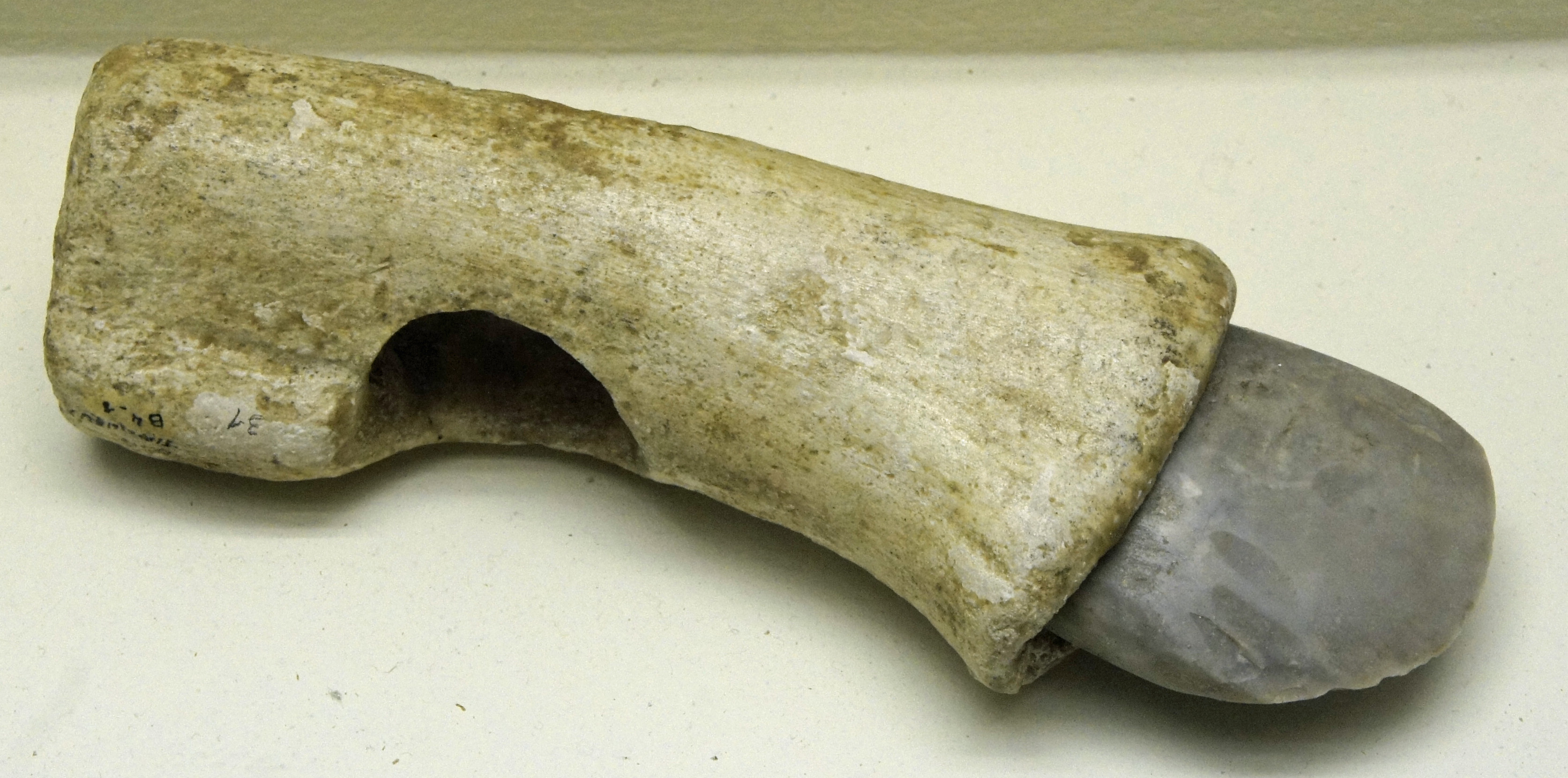 Salle archéologie Musée Saint-Remi . Culture Seine-Oise-Marne .